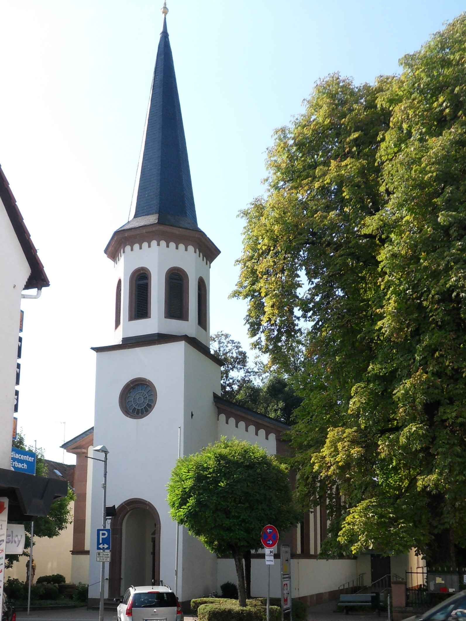 Blick von Osten auf die Katholische Pfarrkirche St. Sophia, Hauptstraße 40 in Erbach (Odenwald)